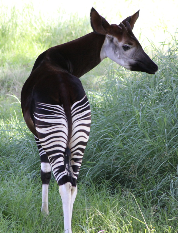 Okapi (Okapia johnstoni)